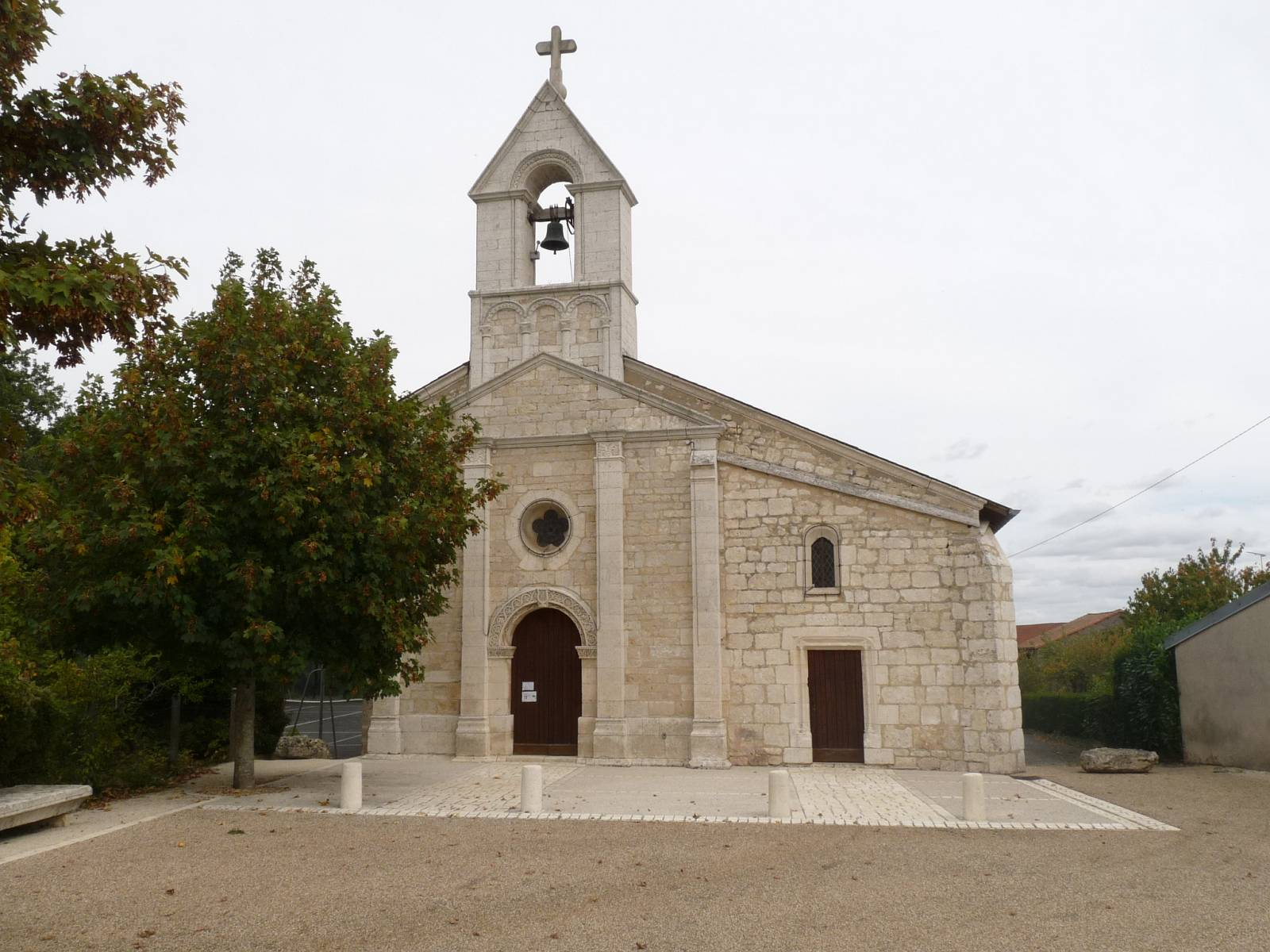 église de Bernac, Charente, France